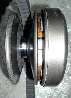 CVT-Fliehkraft.